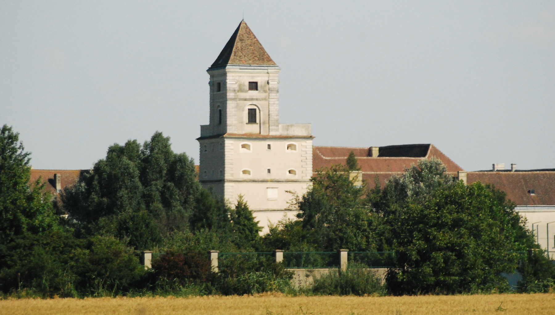 Justizanstalt Schloss Göllersdorf in Niederösterreich